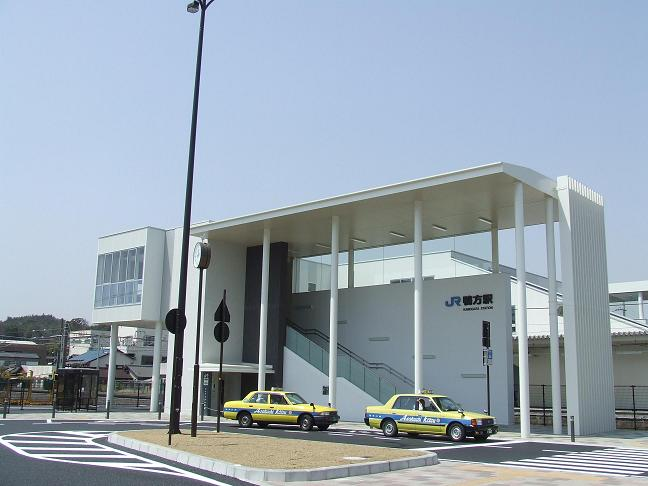 JR山陽本線鴨方駅の新駅舎南口